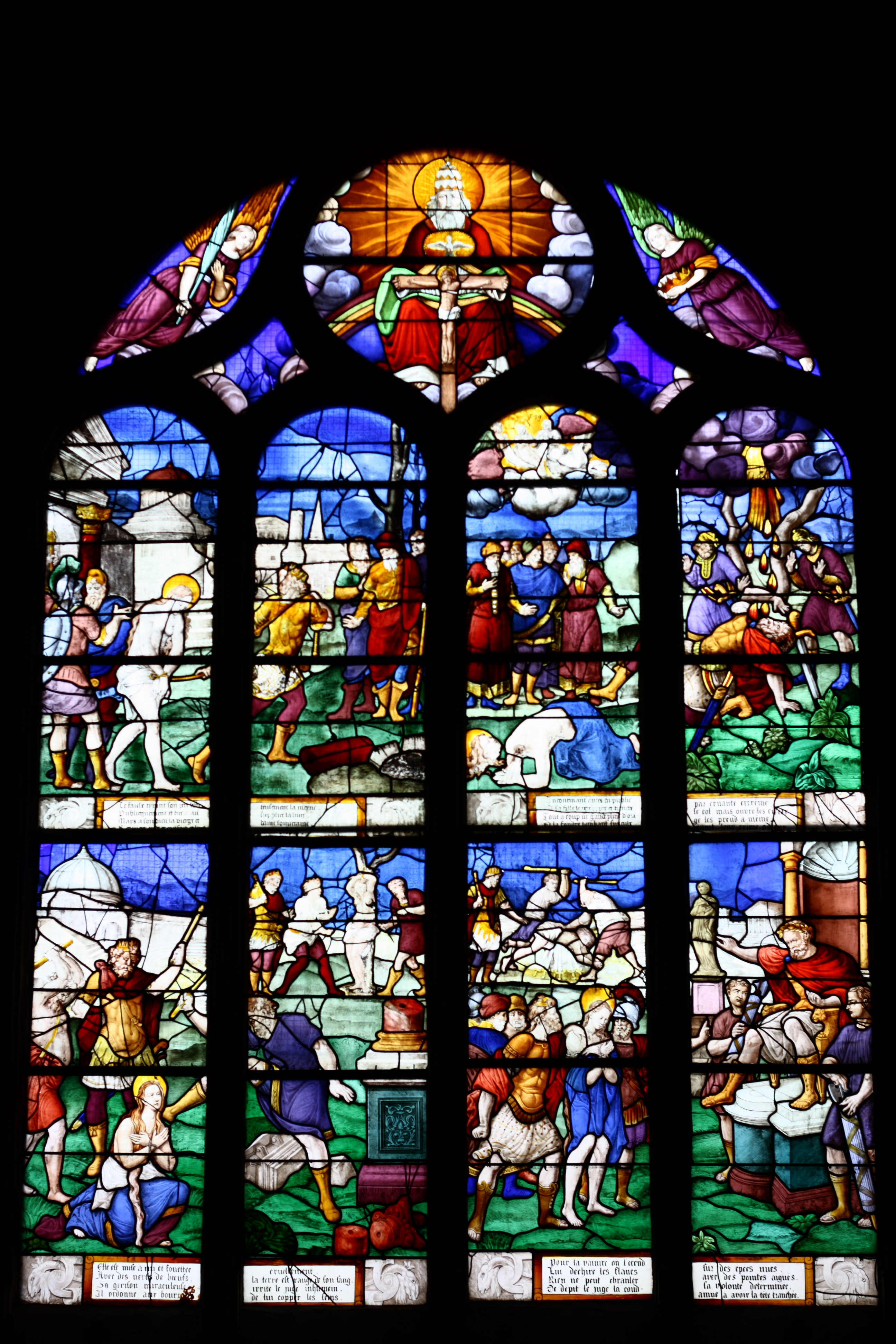 Bleiglasfenster (linkes Seitenschiff) in der katholischen Pfarrkirche Saint-Martin in Groslay, Darstellung: Szenen aus dem Leben der hl. Barbara